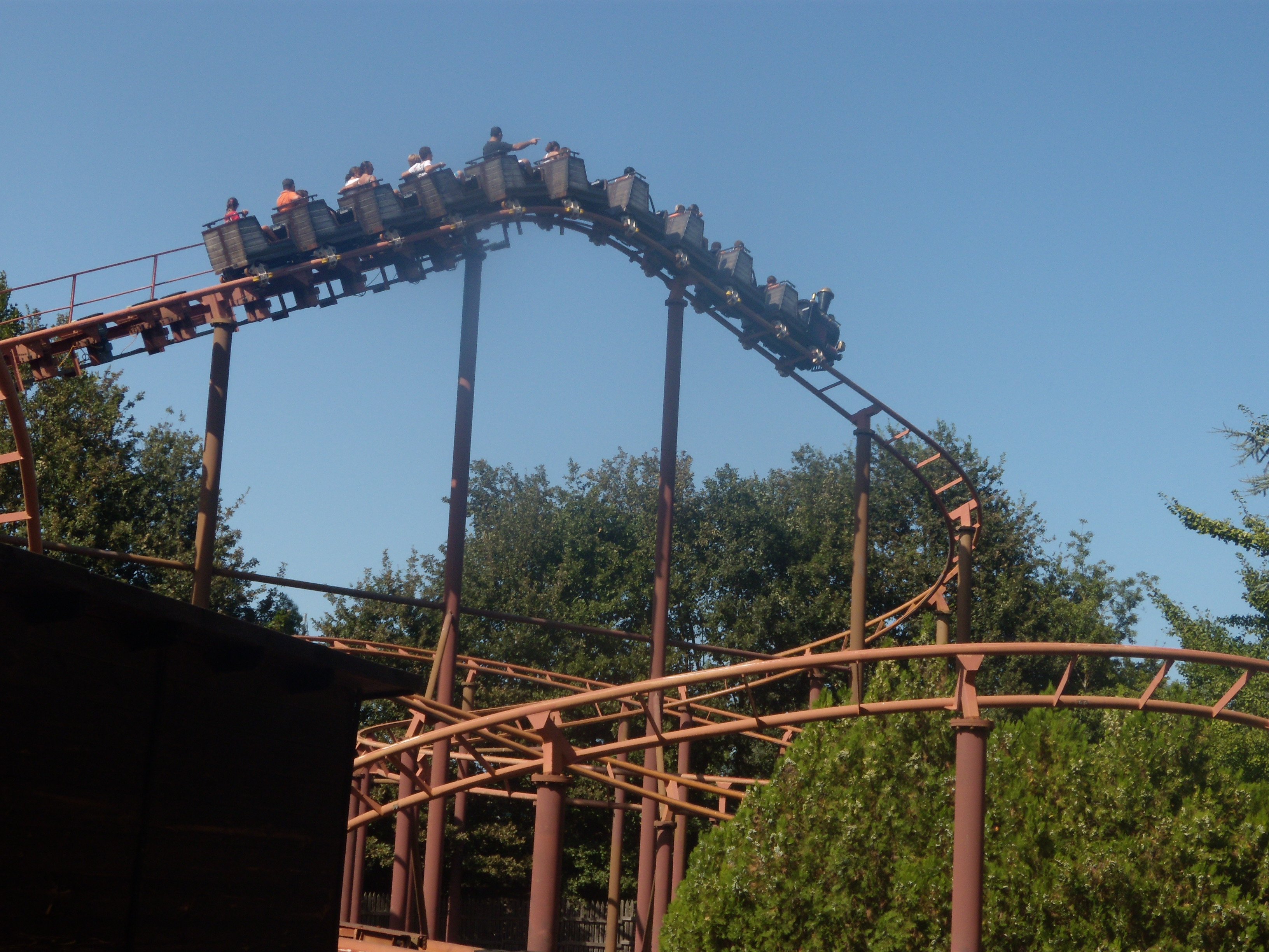 Montagnes russes Family adventure à Mirabilandia.